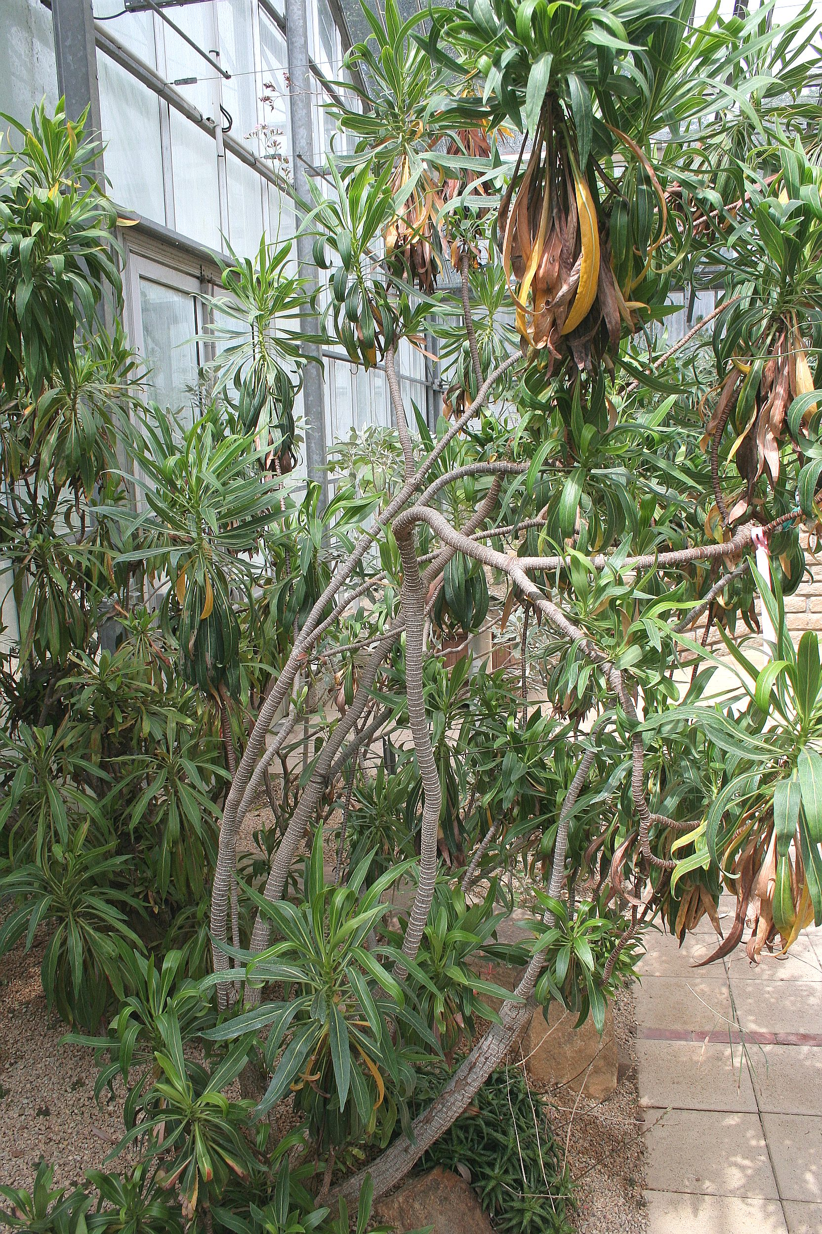 Limonium dendroides Conservatoire botanique national de Brest, France, juin 2007